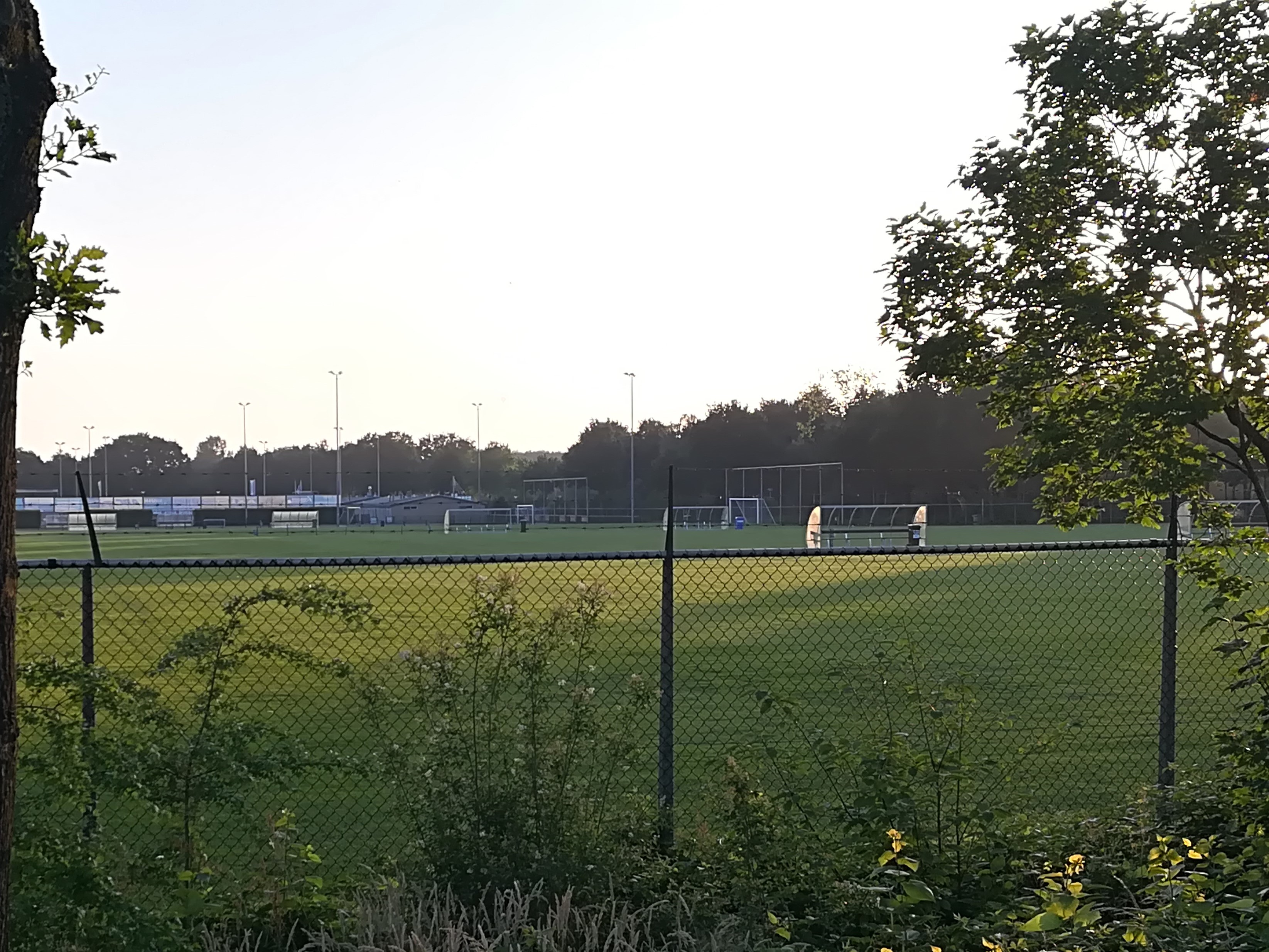 DTS velden Ede